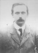 Éamonn Ceannt, líder nacionalista d'Easter Uprising